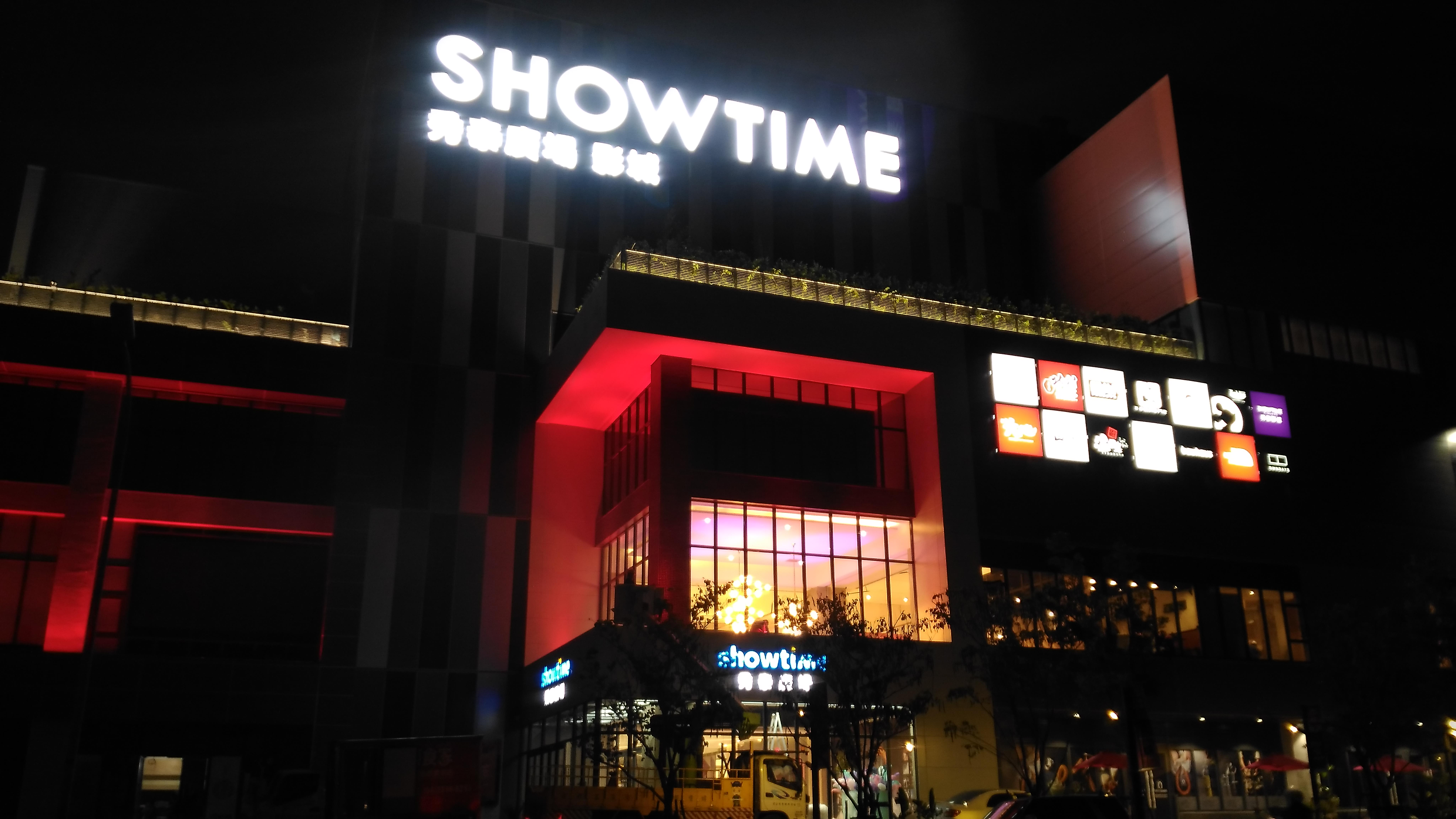 中文（台灣）: 台中秀泰廣場站前店夜晚